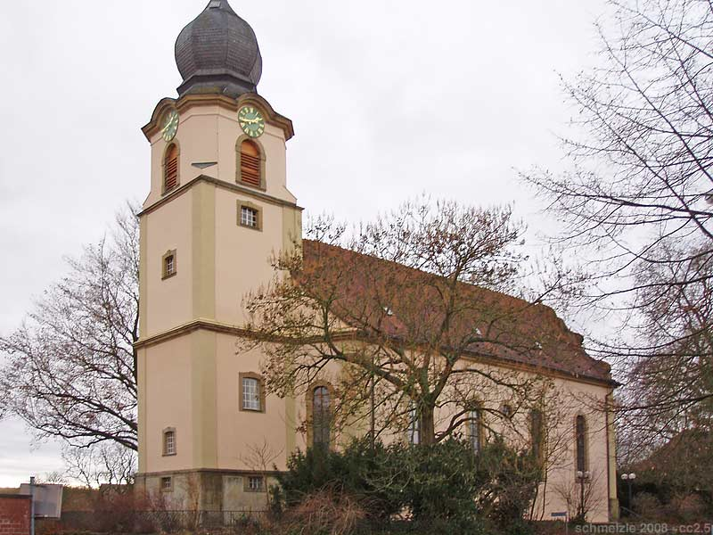 Evangelische Kirche in Bad Rappenau-Bonfeld, Ansicht von Nordosten